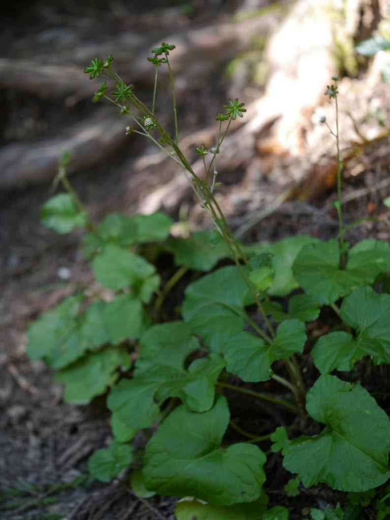 Adenocaulon himalaicum：ノブキ 2014/09/15 和歌山県田辺市：Tanabe City. Wakayama Pref. Japan